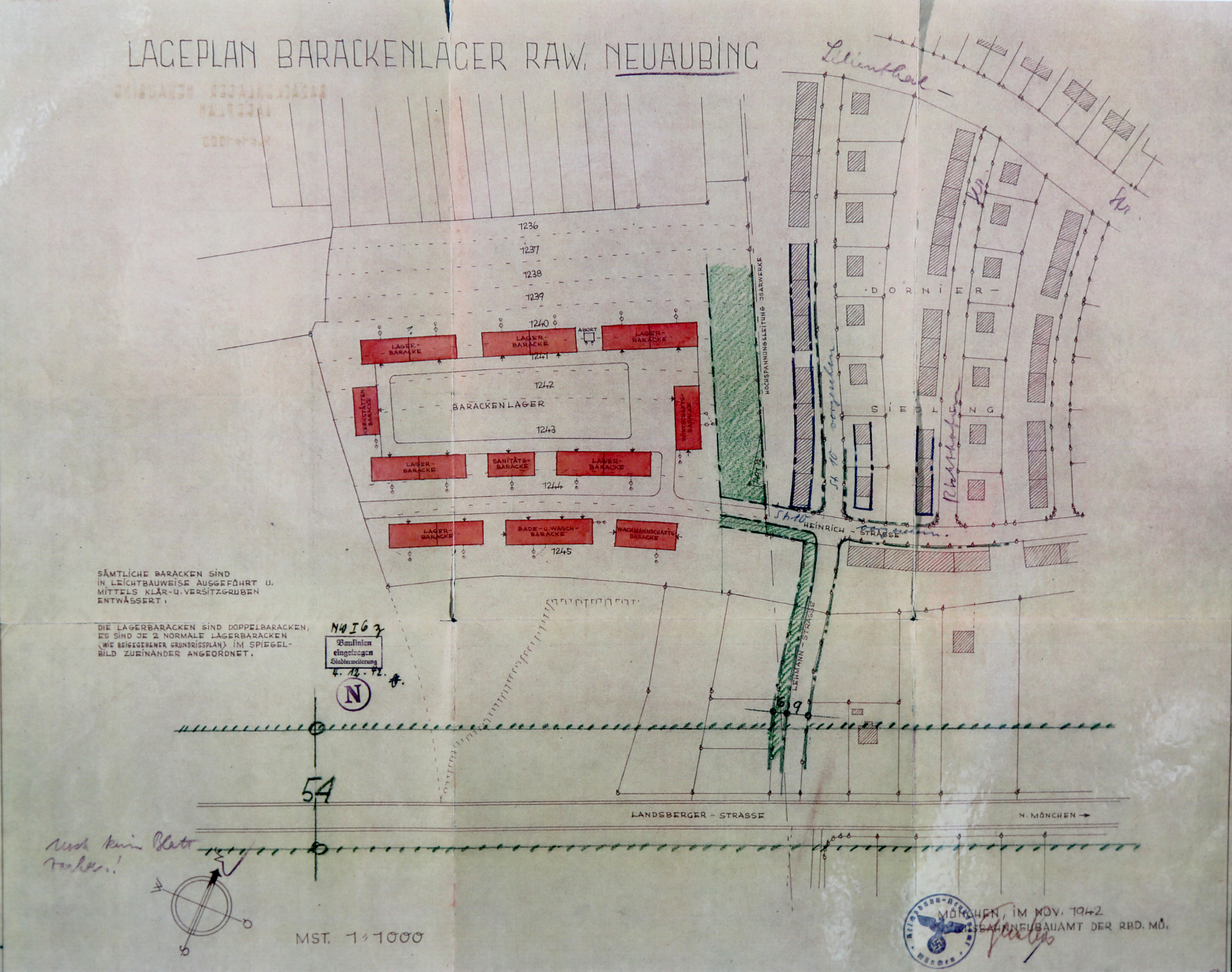 Zwangsarbeiterlager Neuaubing der Deutschen Reichsbahn. Im Lager lebten von Mai1942 bis Mai 1945 Zivilarbeiter und Zwangsarbeiter aus West- und Osteuropa, die im Reichsbahnausbesserungswerk Neuaubing ausgebeutet wurden. Der Bauplan von 1942 entspricht nicht ganz der verwirklichten Anlage. Die Werkstättenbaracke im Westen wurde nie gebaut, die Baracke im Südwesten wurde zu einem nicht bekannten Zeitpunkt abgerissen. Zwischen der Wirtschaftsbaracke im Osten und der im Nordosten anschließenden wurde ein verbindender Trakt errichtet, so dass die Nordostecke der Anlange geschlossen ist.